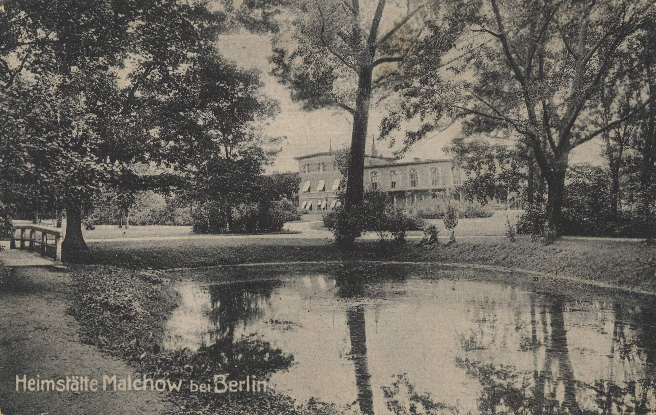 Heimstätte Malchow (Lungenheilstätte)